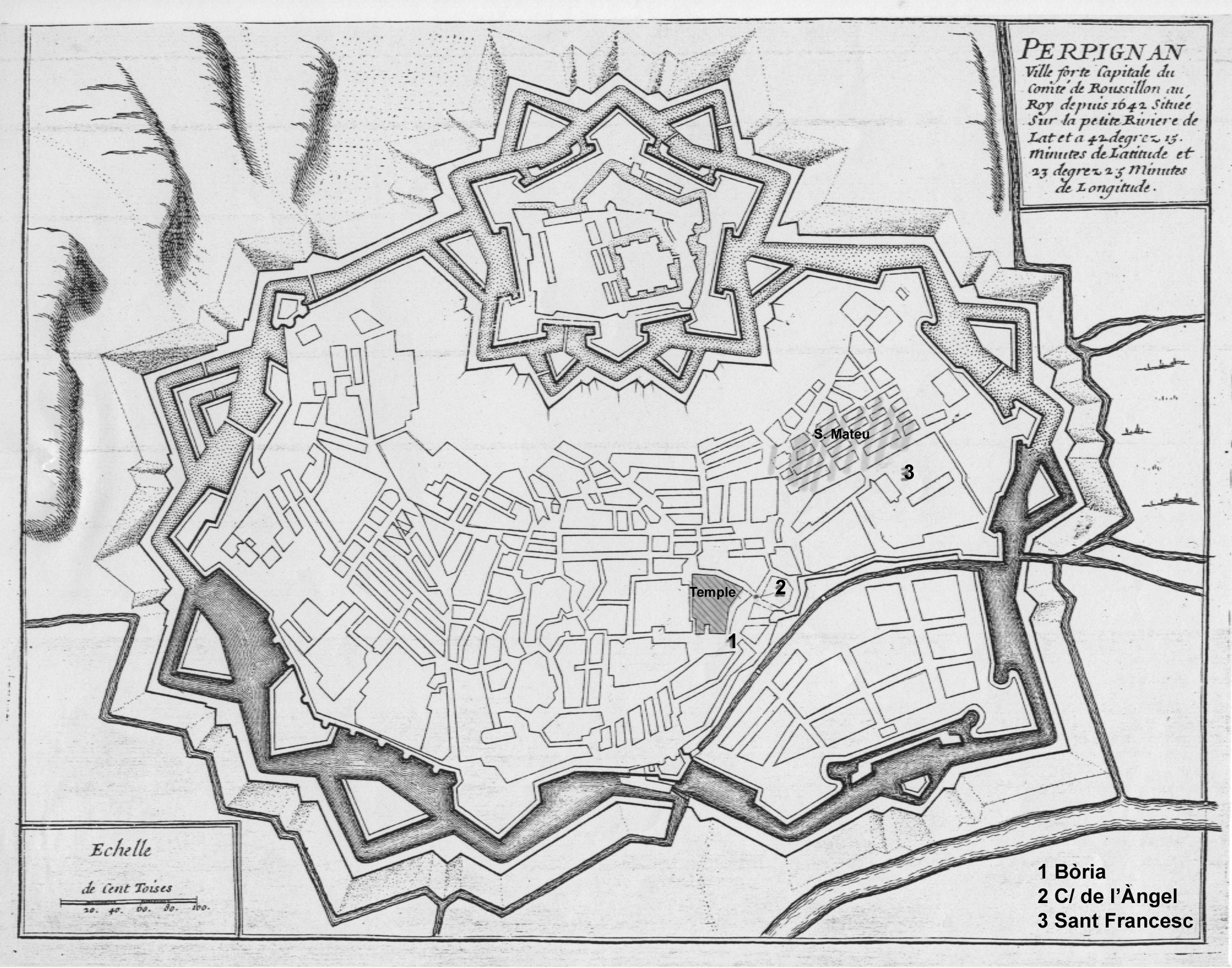 La ciutat de Perpinyà al segle XVIII. Gravat